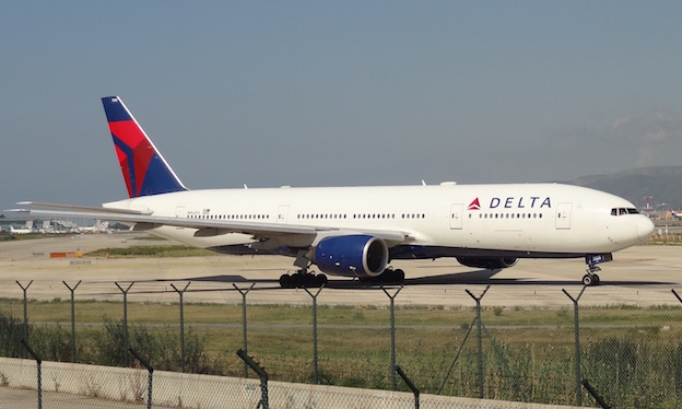 Delta barcelona